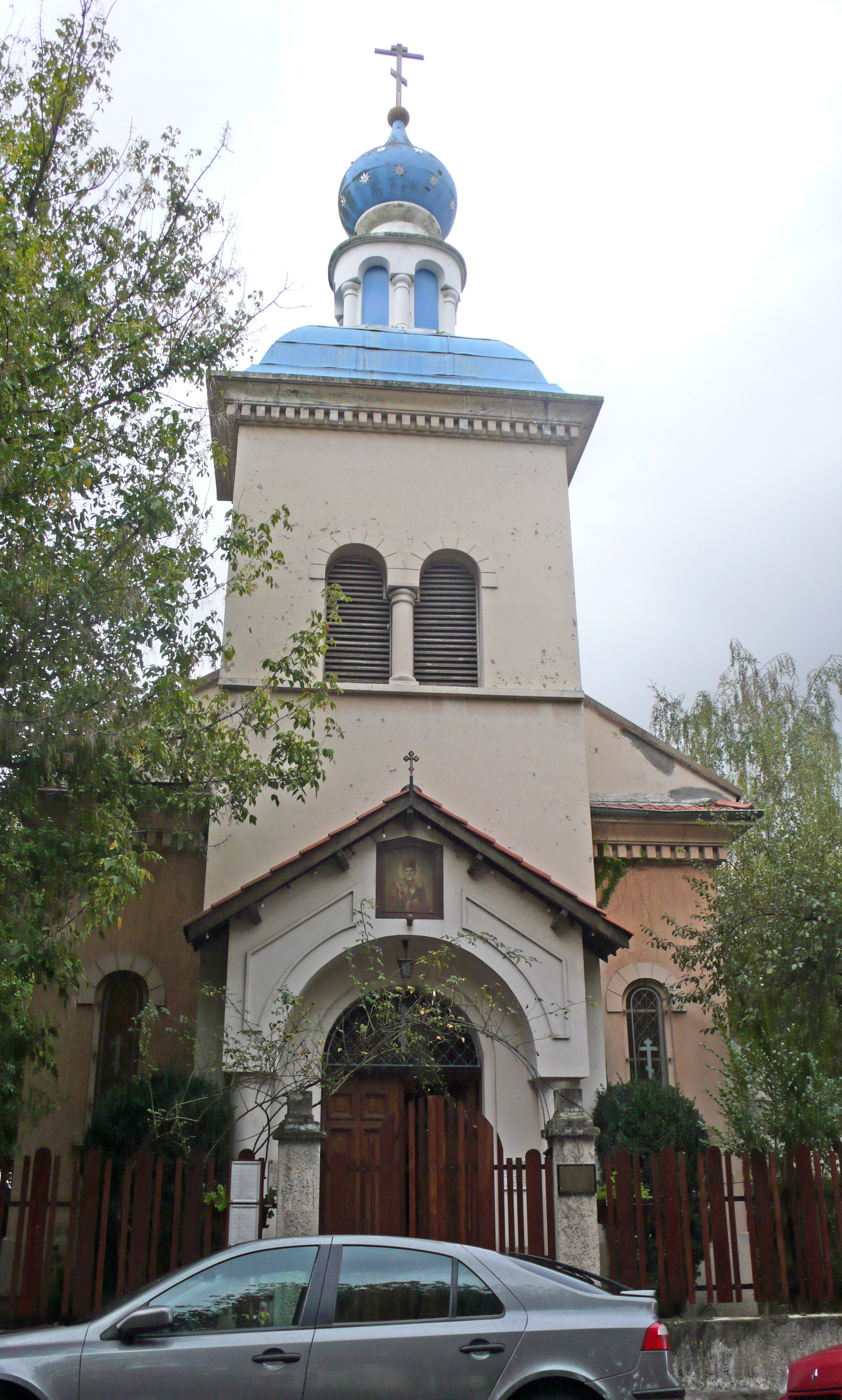 Église Orthodoxe Russe Saint-Nicolas. 5, rue Sainte-Geneviève, F-69006 Lyon, France. Église orthodoxe non canonique (église orthodoxe russe hors frontières - Autorité suprême provisoire de l'Église.)